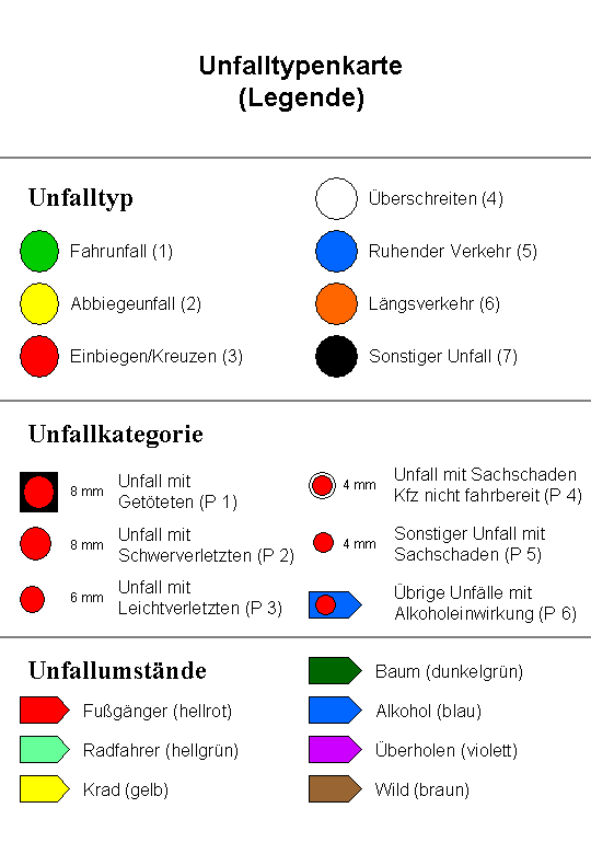 Legende einer Unfalltypenmkarte